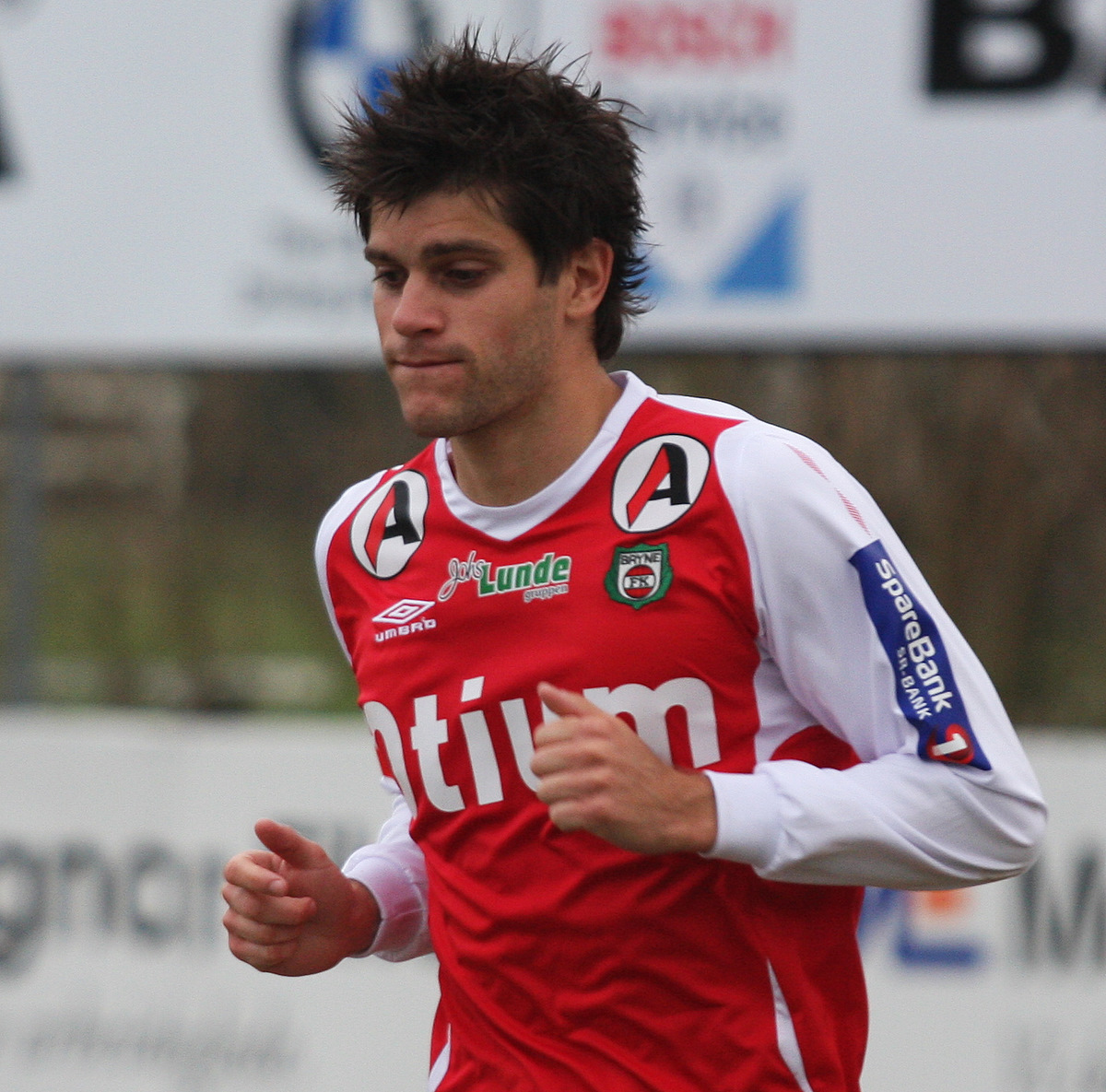 Marius_Helle, Bryne FK